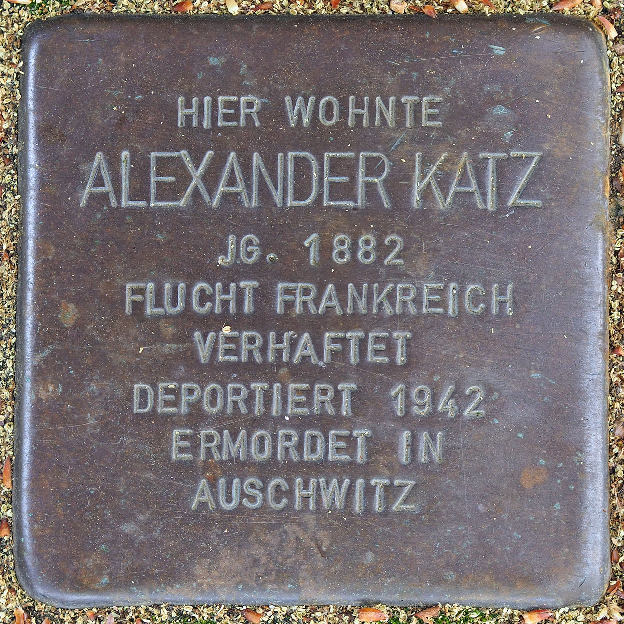 Stolpersteine GV Katz Alexander